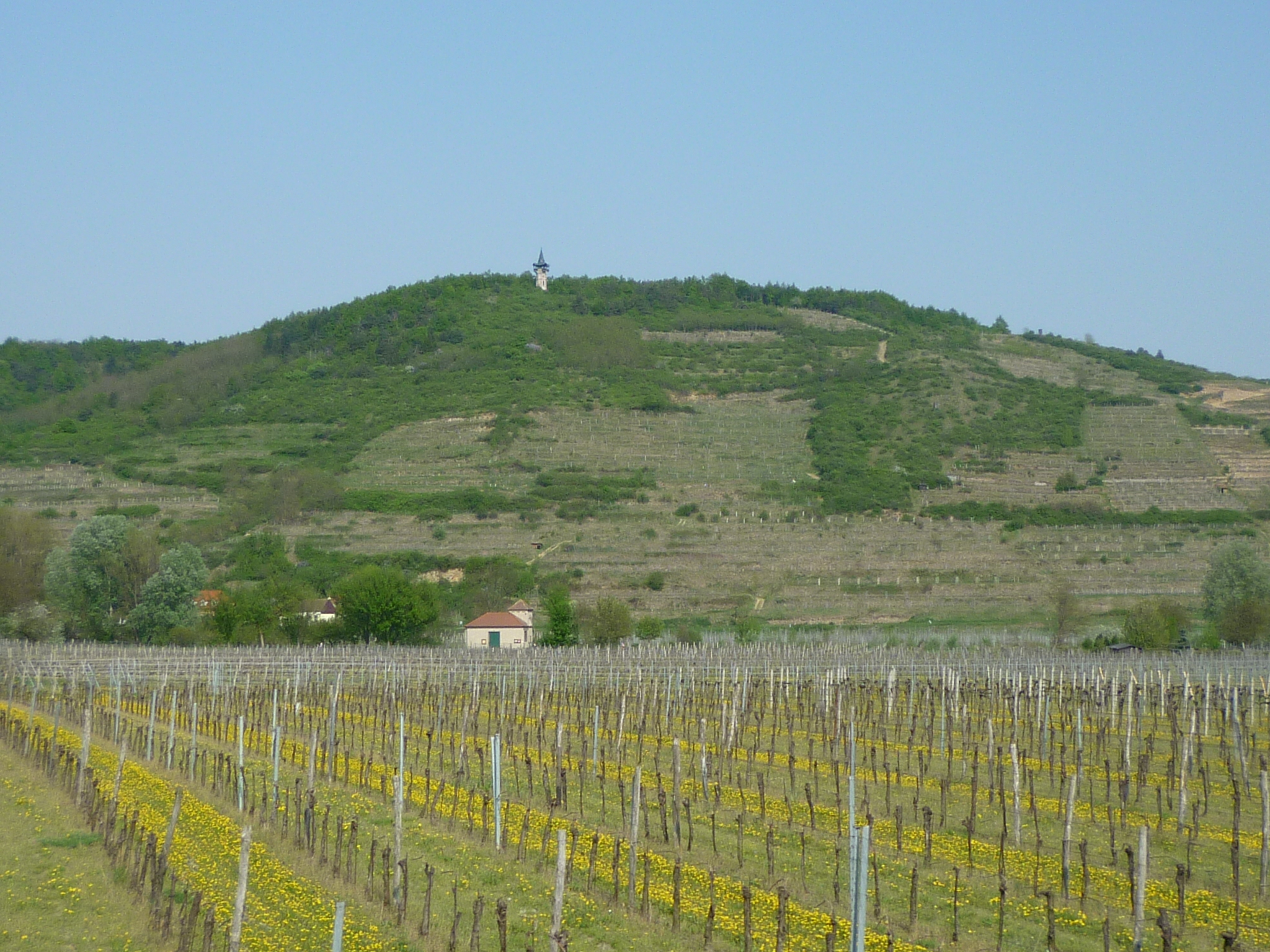 Stadt Langenlois, Ort Zöbing, Niederösterreich. Heligenstein mit Kamptalwarte.